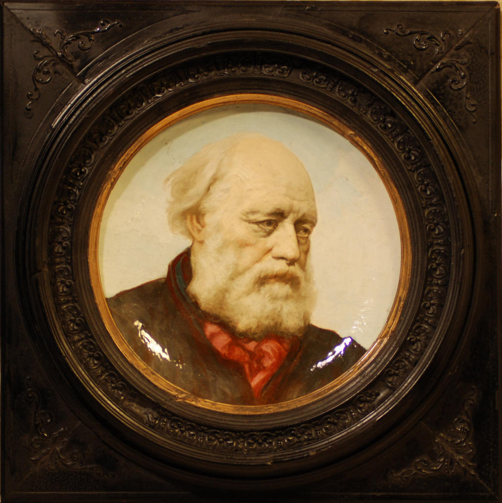 Plat de Félix Optat Milet